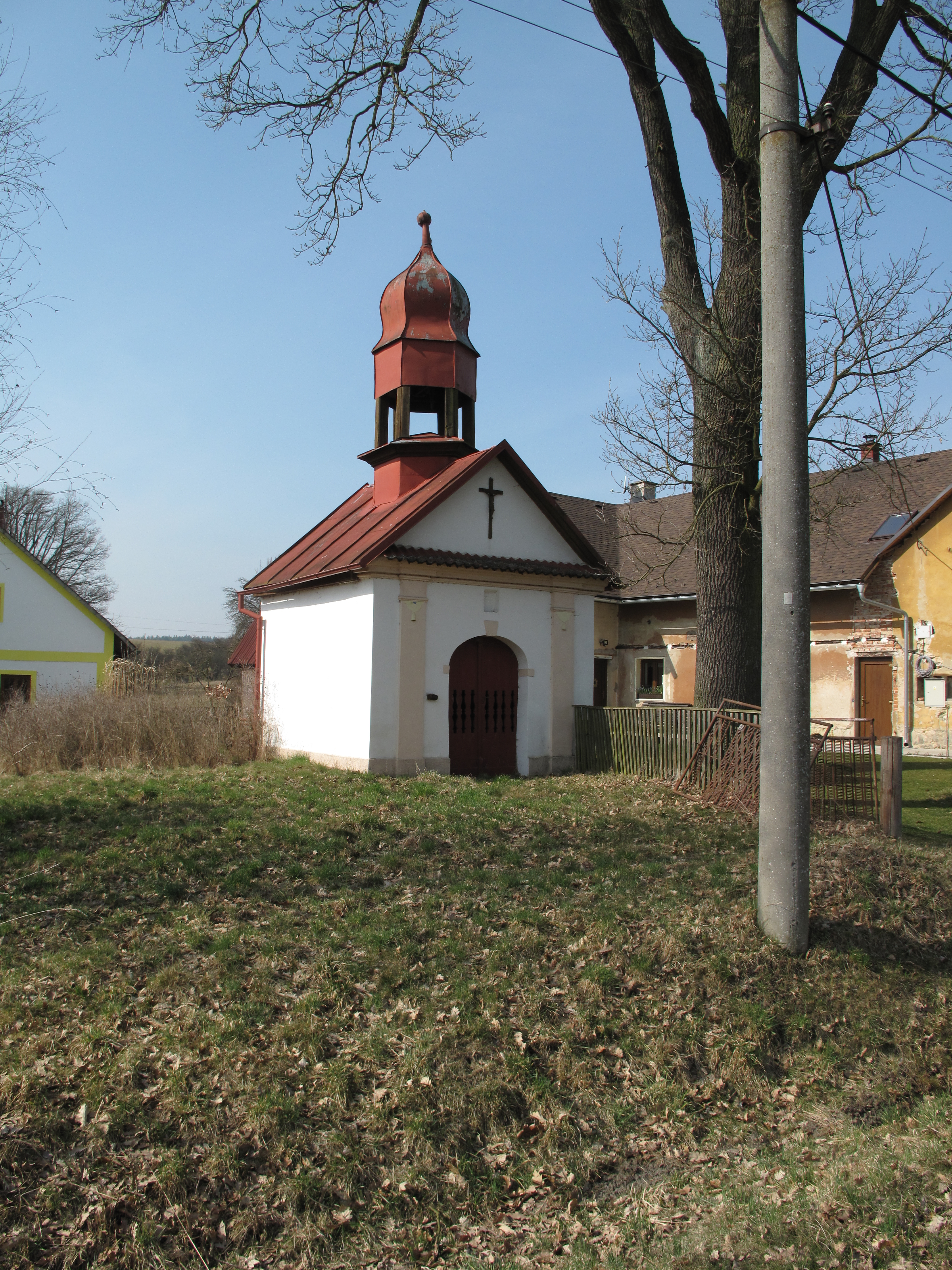 Kaplička v Horní Rokyté. Okres Mladá Boleslav, Česká republika.